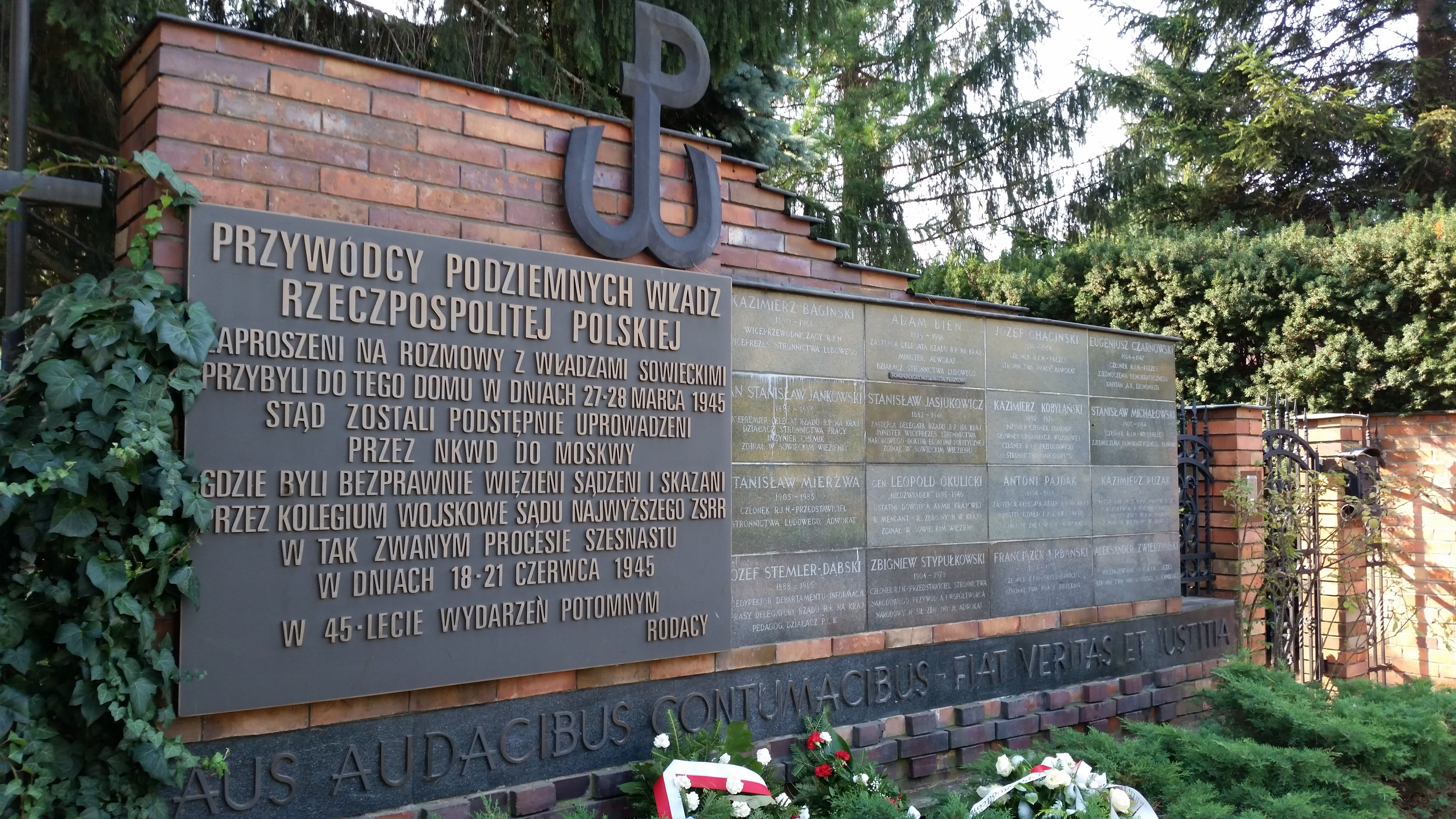 Tablica pamiątkowa przed willą, do której w dniach 27-28 marca 1945, zostali zaproszeni na rozmowy z władzami sowieckimi przywódcy podziemnych władz Rzeczypospolitej Polskiej, a następnie podstępnie uprowadzeni przez NKWD do Moskwy, gdzie byli bezprawnie więzieni, sądzeni i skazani przez Kolegium Wojskowe Sądu Najwyższego ZSRR w dniach 18-21 czerwca 1945.